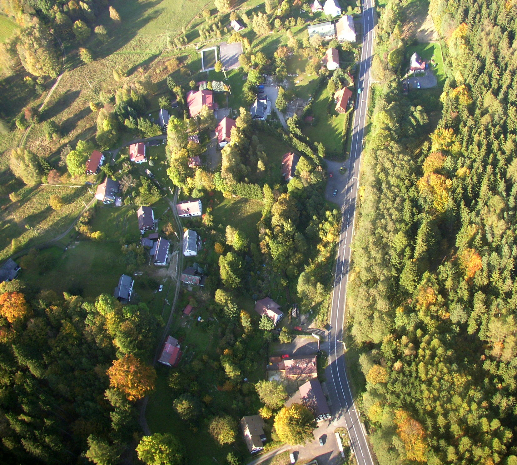 Osada Lesné, Jiřetín pod Jedlovou, Lužické hory, Česká republika.